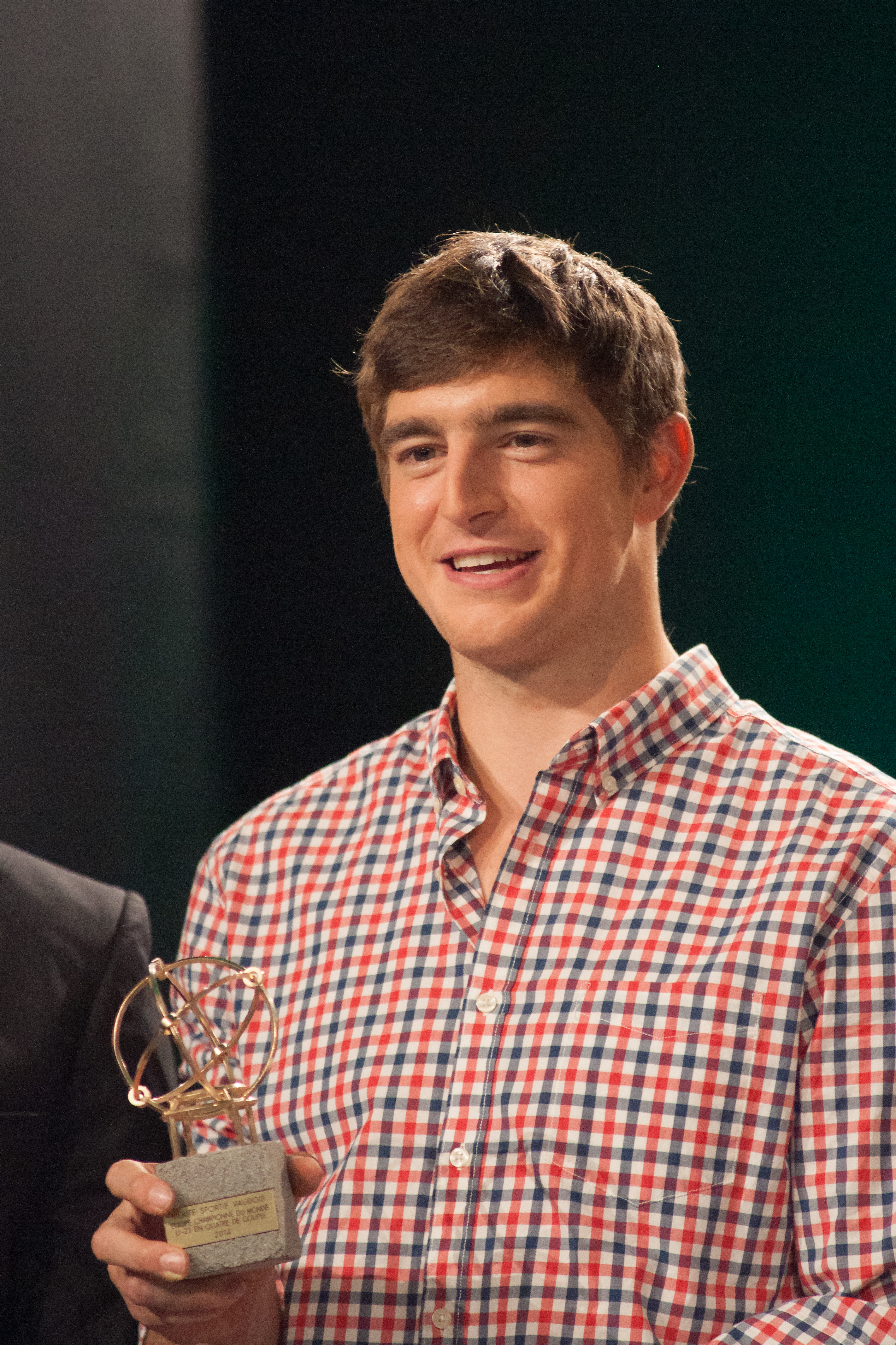 Mérite sportif vaudois 2014 - Augustin Maillefer